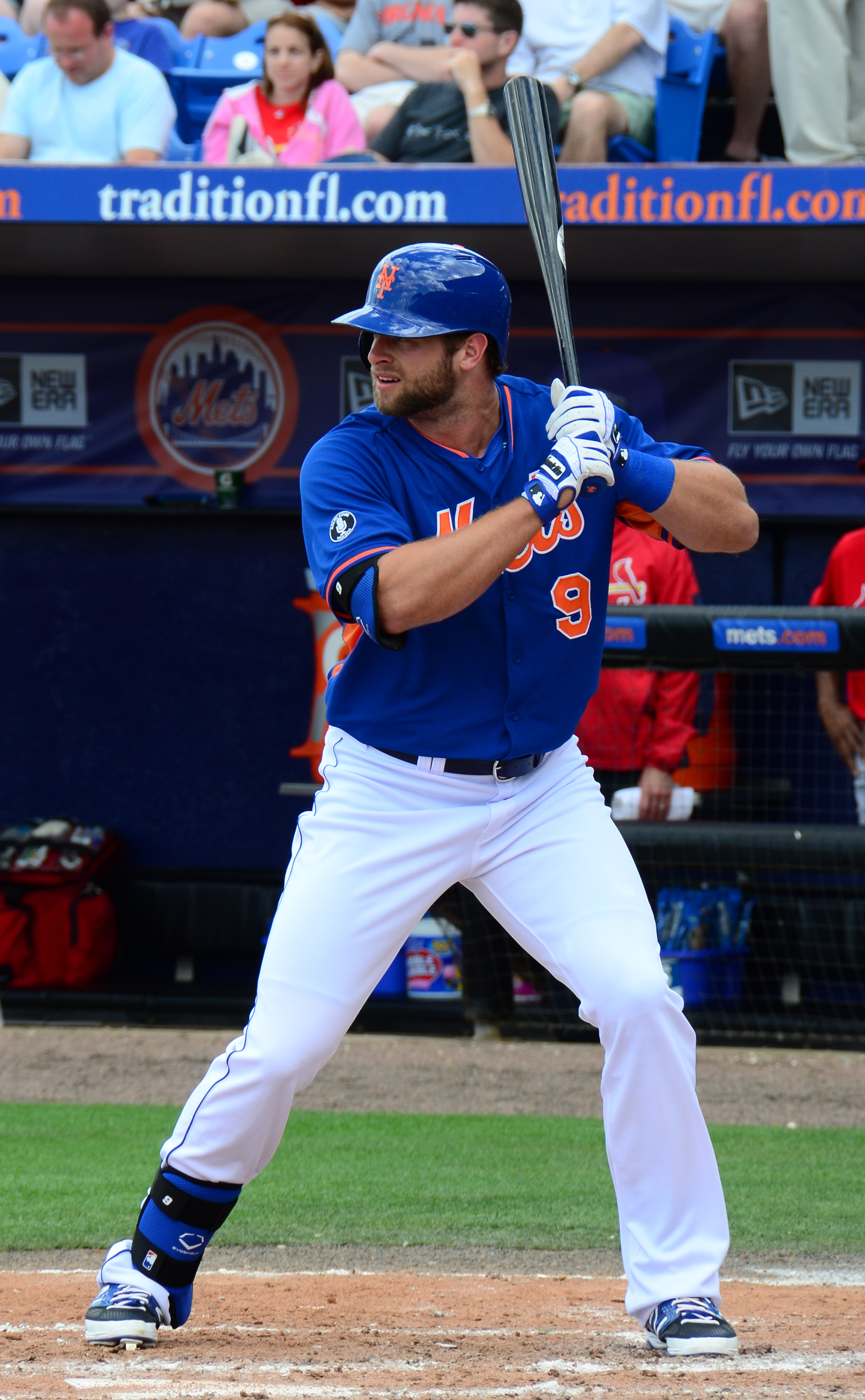 Kirk Nieuwenhuis